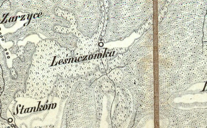 Leśniczówka (pow. chełmski) na mapie D. G. Reymanna (XIX w.)